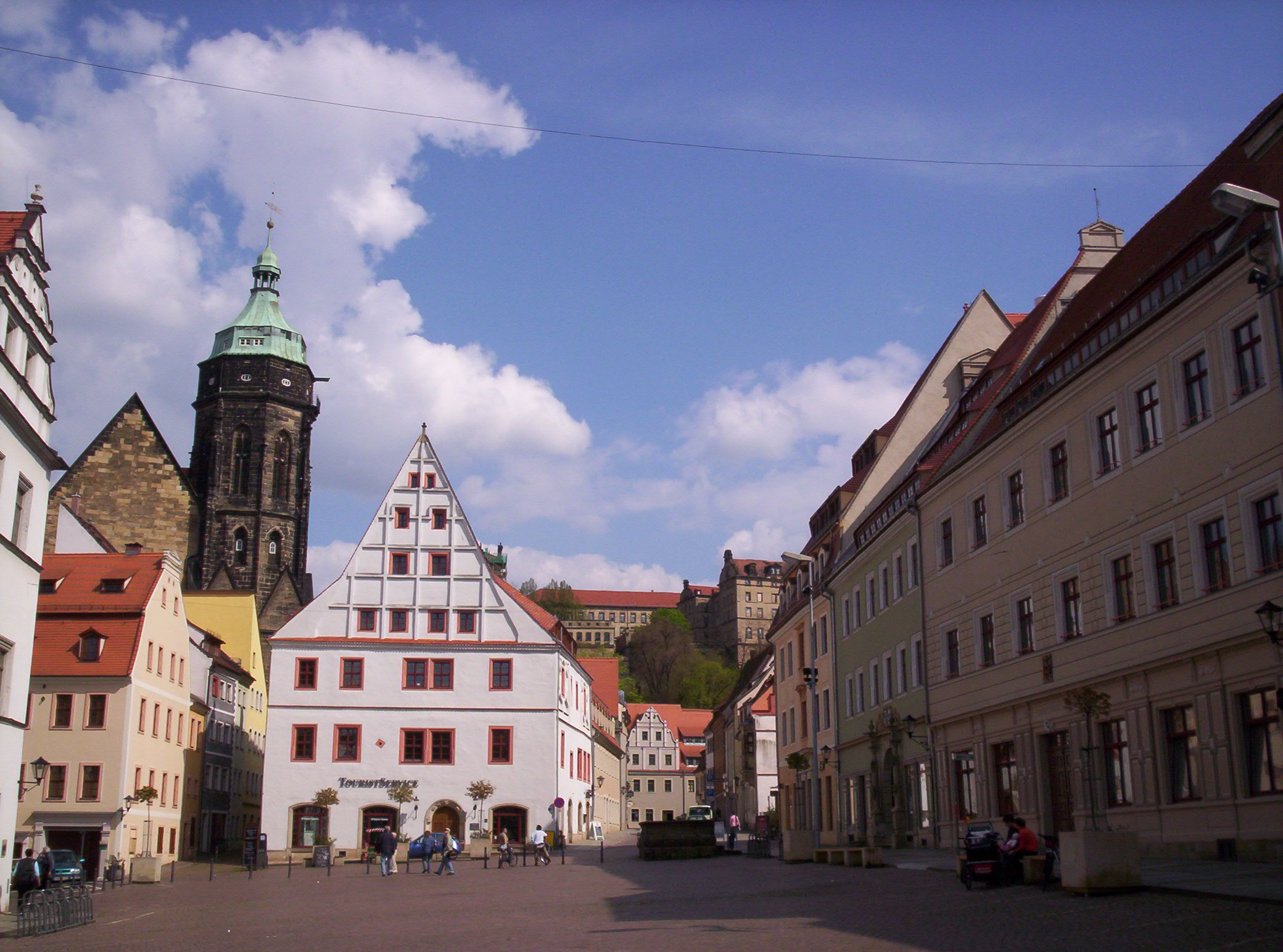 Pirna Canalettoblick